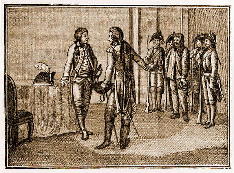 Комендант Яицка полковник Иван Яковлевич Симонов передает Е.И. Пугачева А.В. Суворову 16 сентября 1774 года